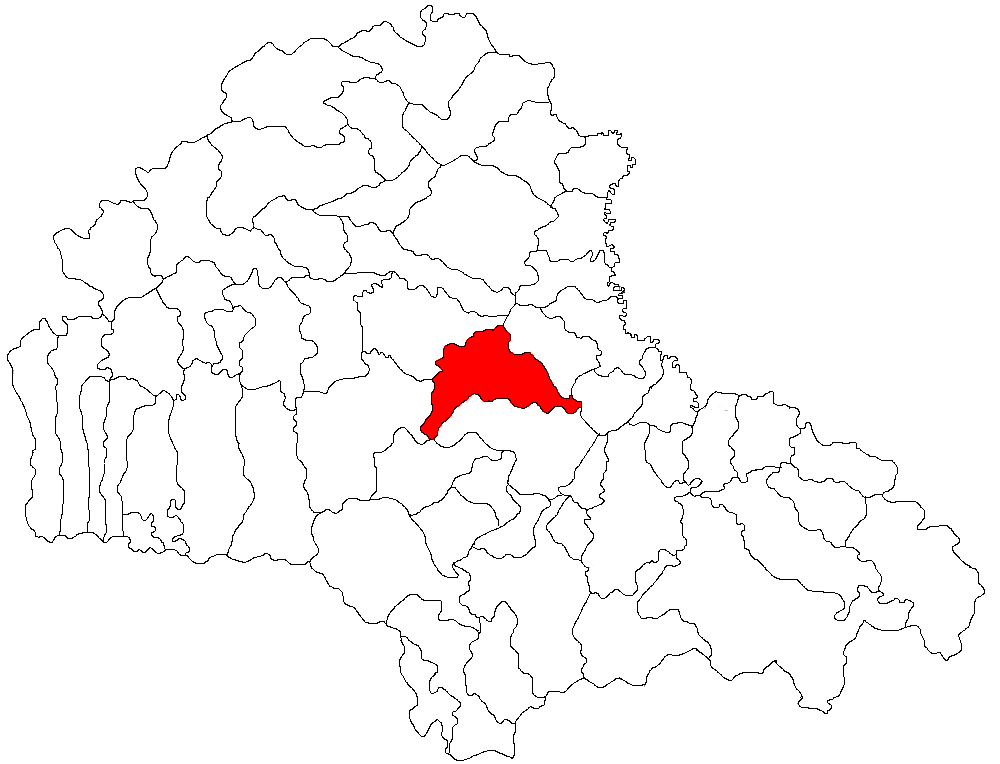 Categorie:Hărţi ale judeţului Braşov